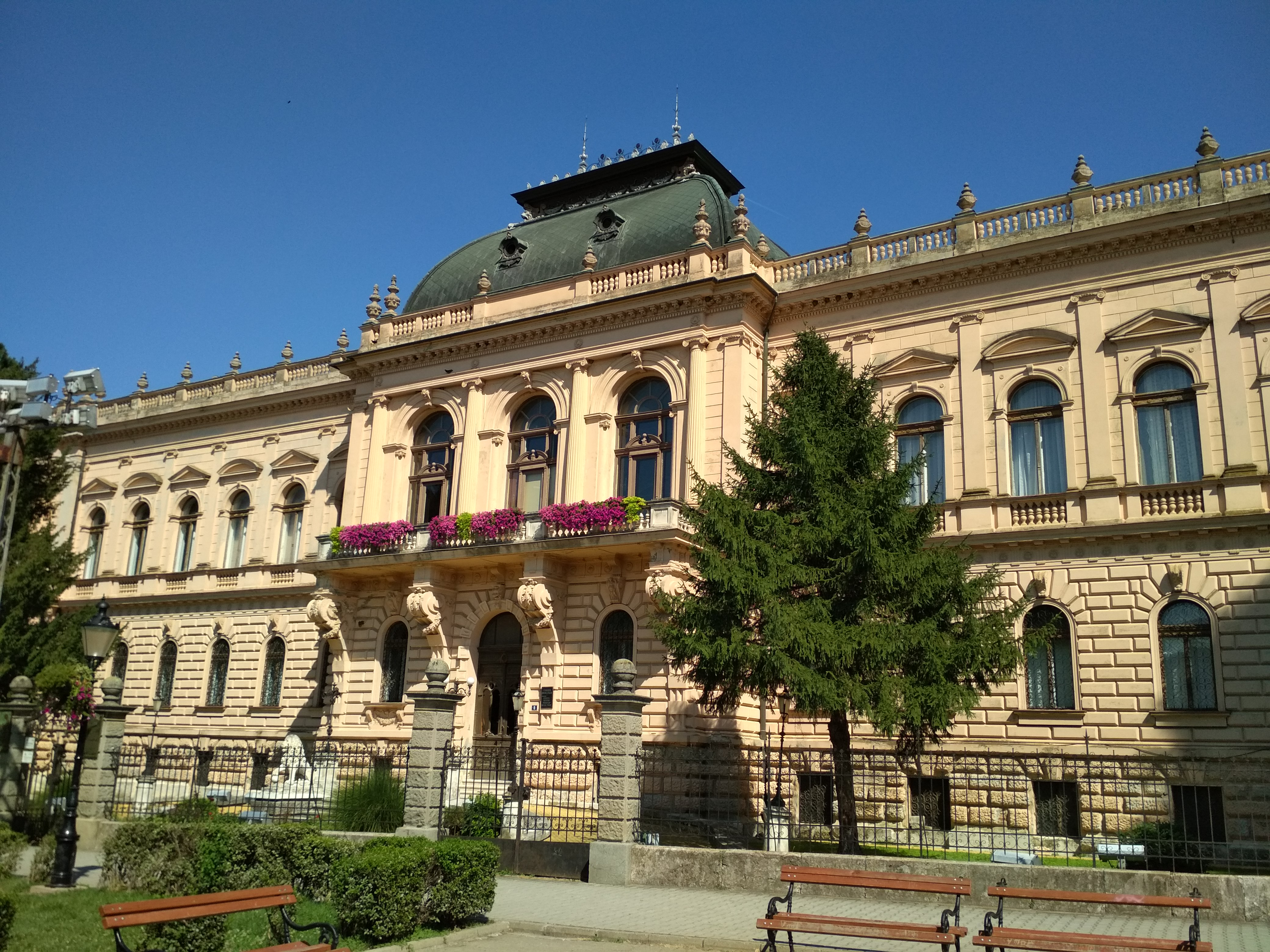 Српски (ћирилица): Здање је подигнуто за потребе интерната за ђаке карловачке Богословије 1901-1903. године под покровитељством патријарха Георгија Бранковића. Аутор пројекта био је архитекта Владимир Николић.